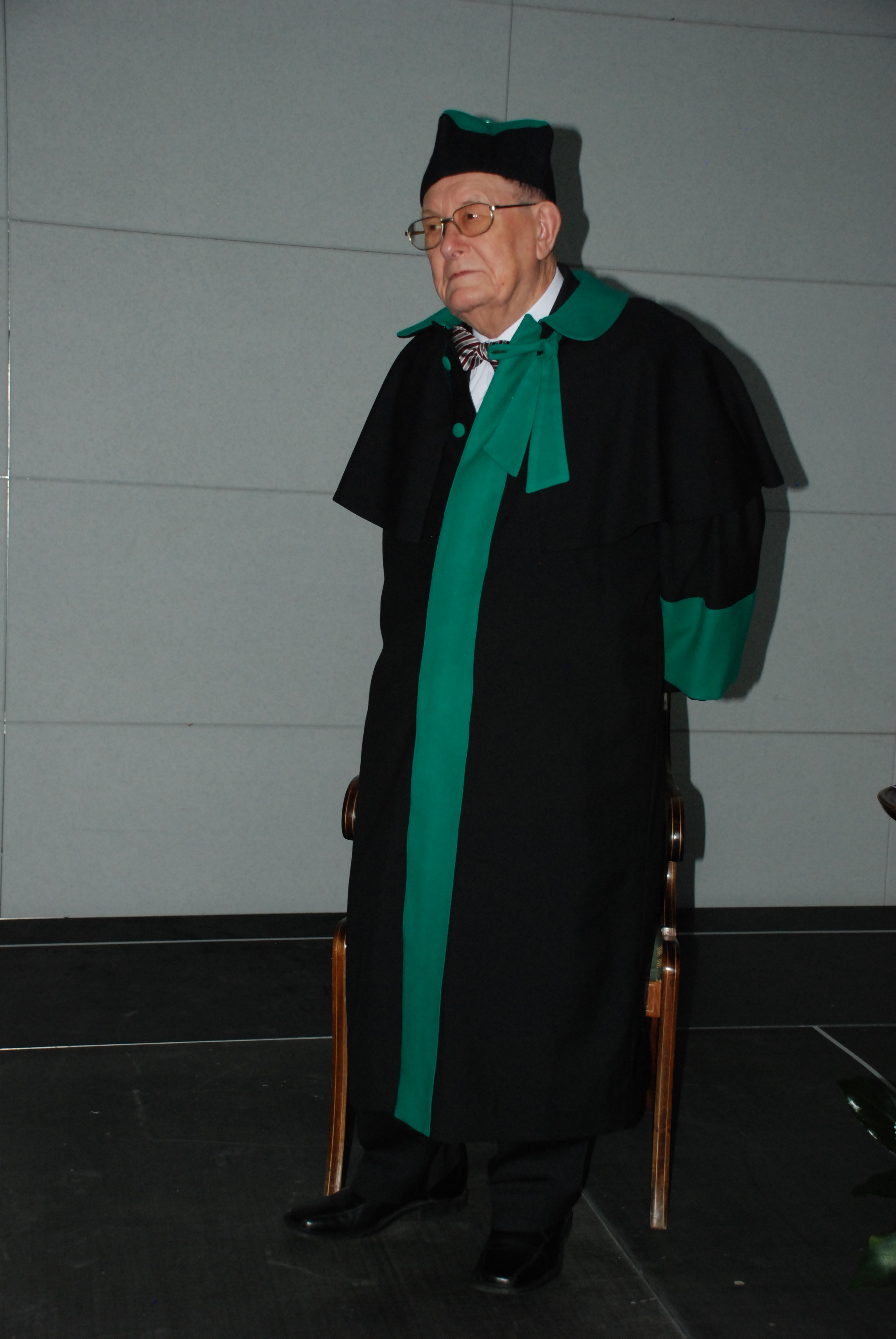 Prof. zw. Witold Czarnecki - nadanie tytułu Profesora Honorowego Politechniki Białostockie